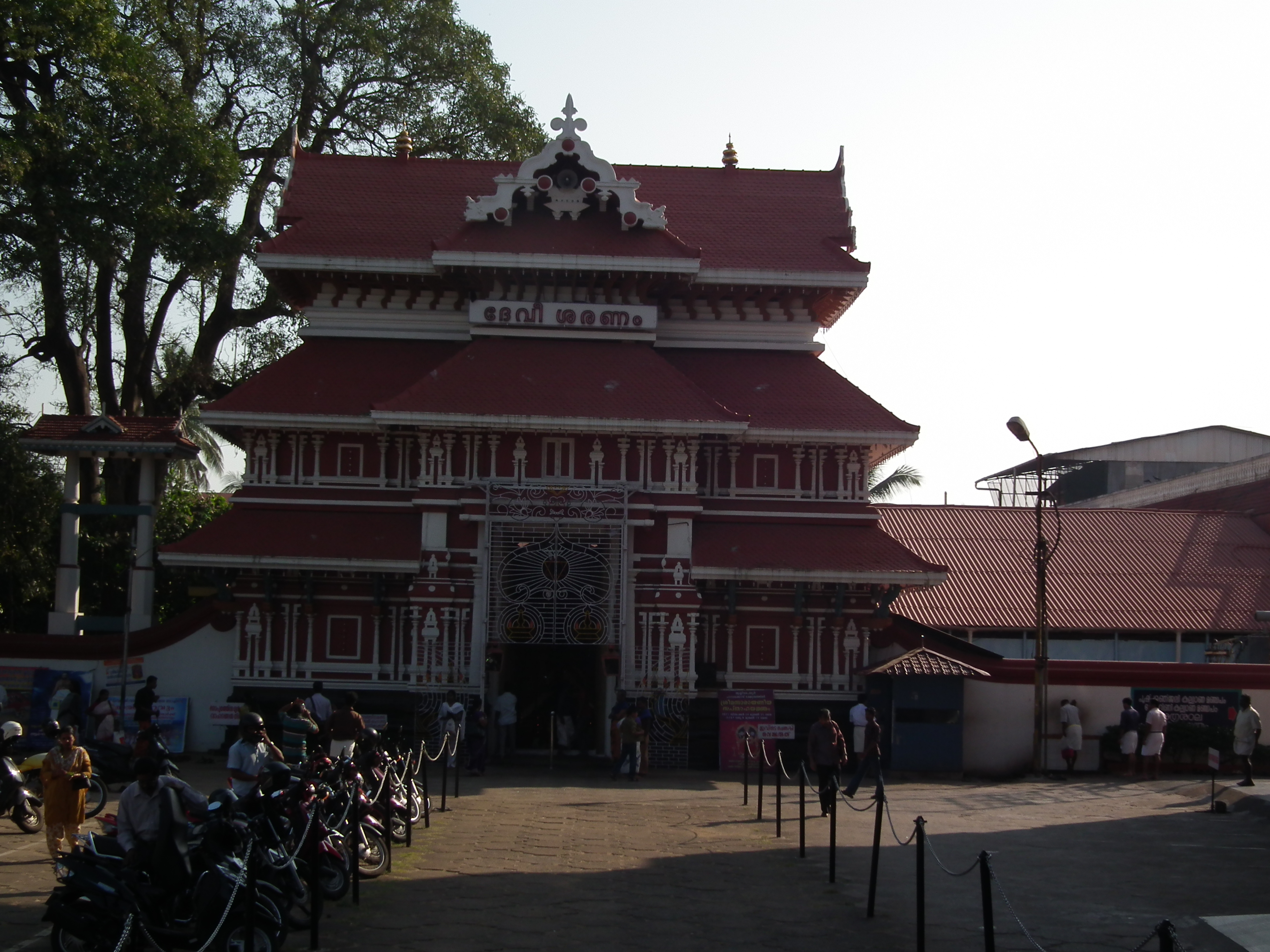 Paramekkavu Bagavathi Temple, Thrissur